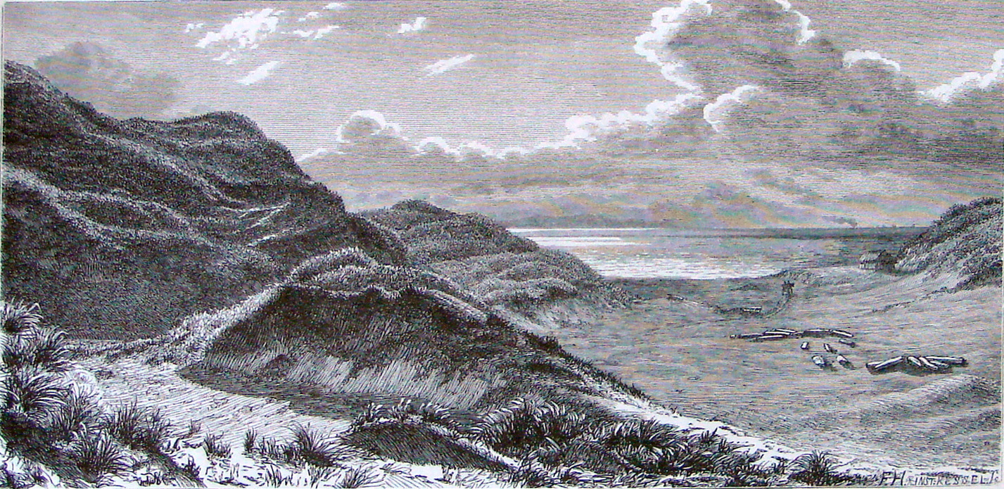 Kandestederne , south of Skagen , Jutland, Denmark.